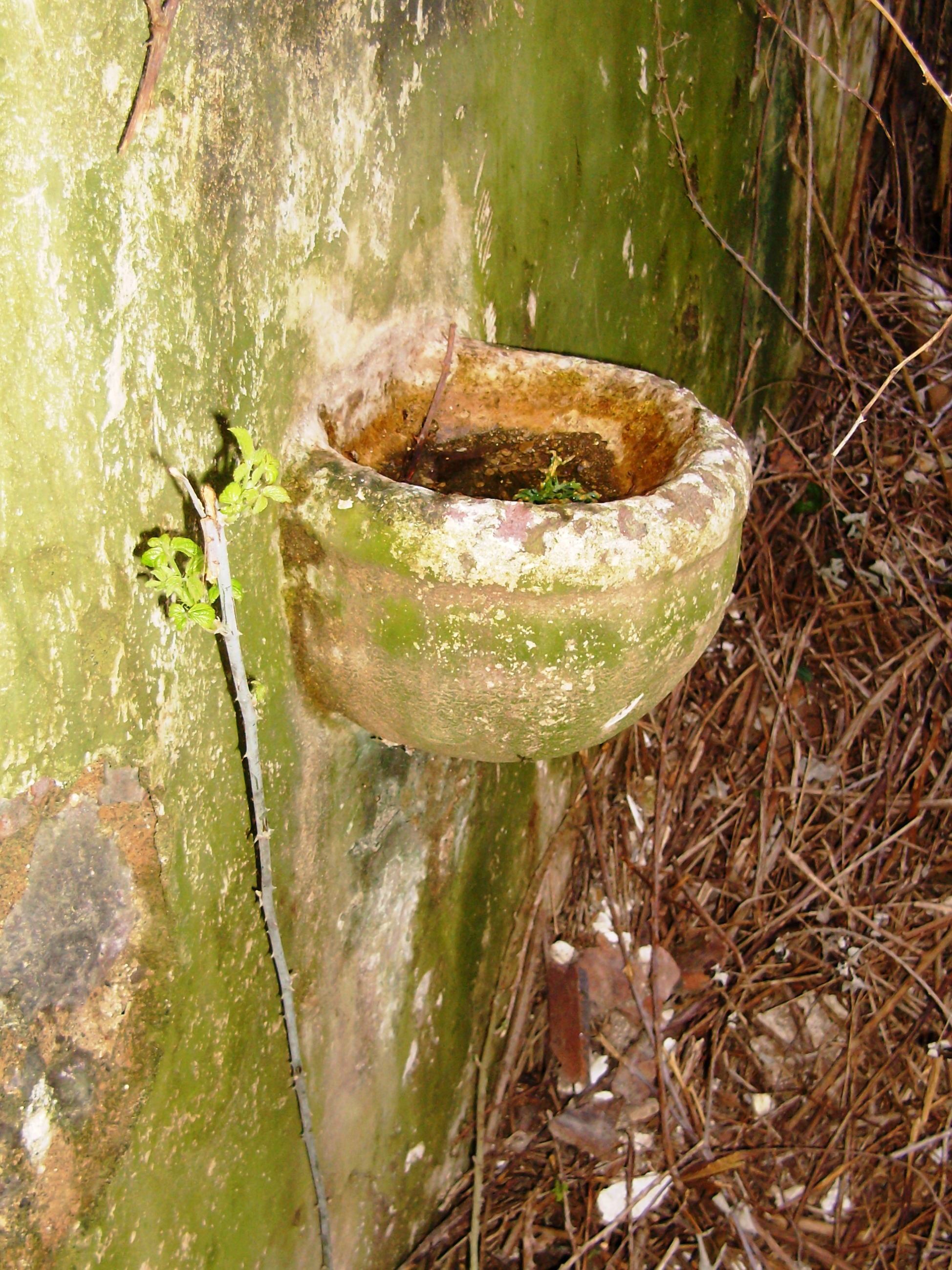 Ermida de Nossa Senhora do Livramento, Vila do Porto, ilha de Santa Maria, Açores: pia batismal.